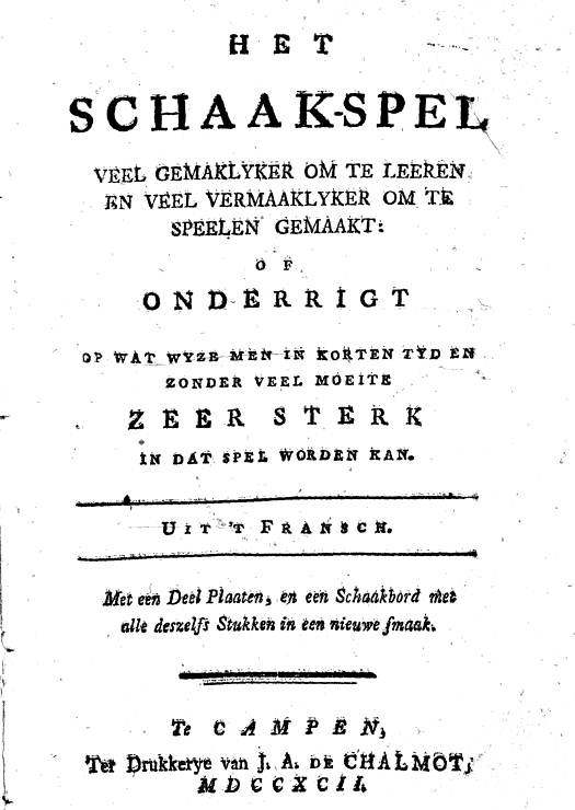 Titelblad van Het schaakspel veel gemaklyker om te leeren en veel vermaaklyker om te speelen gemaakt" door Philip Julius van Zuylen van Nijevelt (1743-1826)